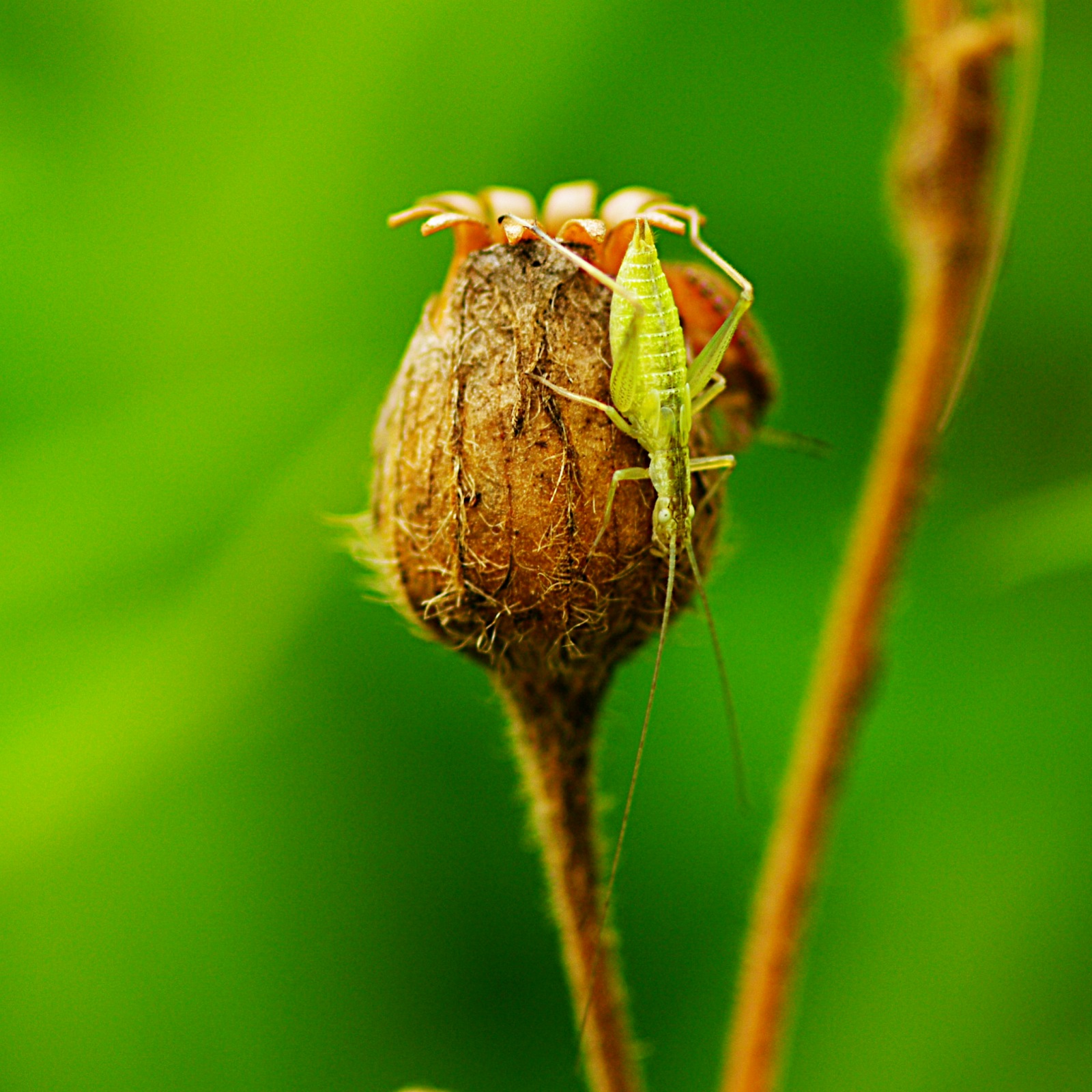 カンタンの幼虫